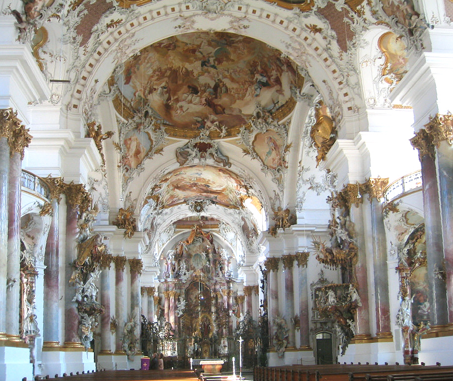 Zwiefalten: Ehemalige Benedektinerabtei, Das Innere des Münsters Fresken von Franz Joseph Spiegler, Stuck von Johann Michael Feuchtmayer d. J.